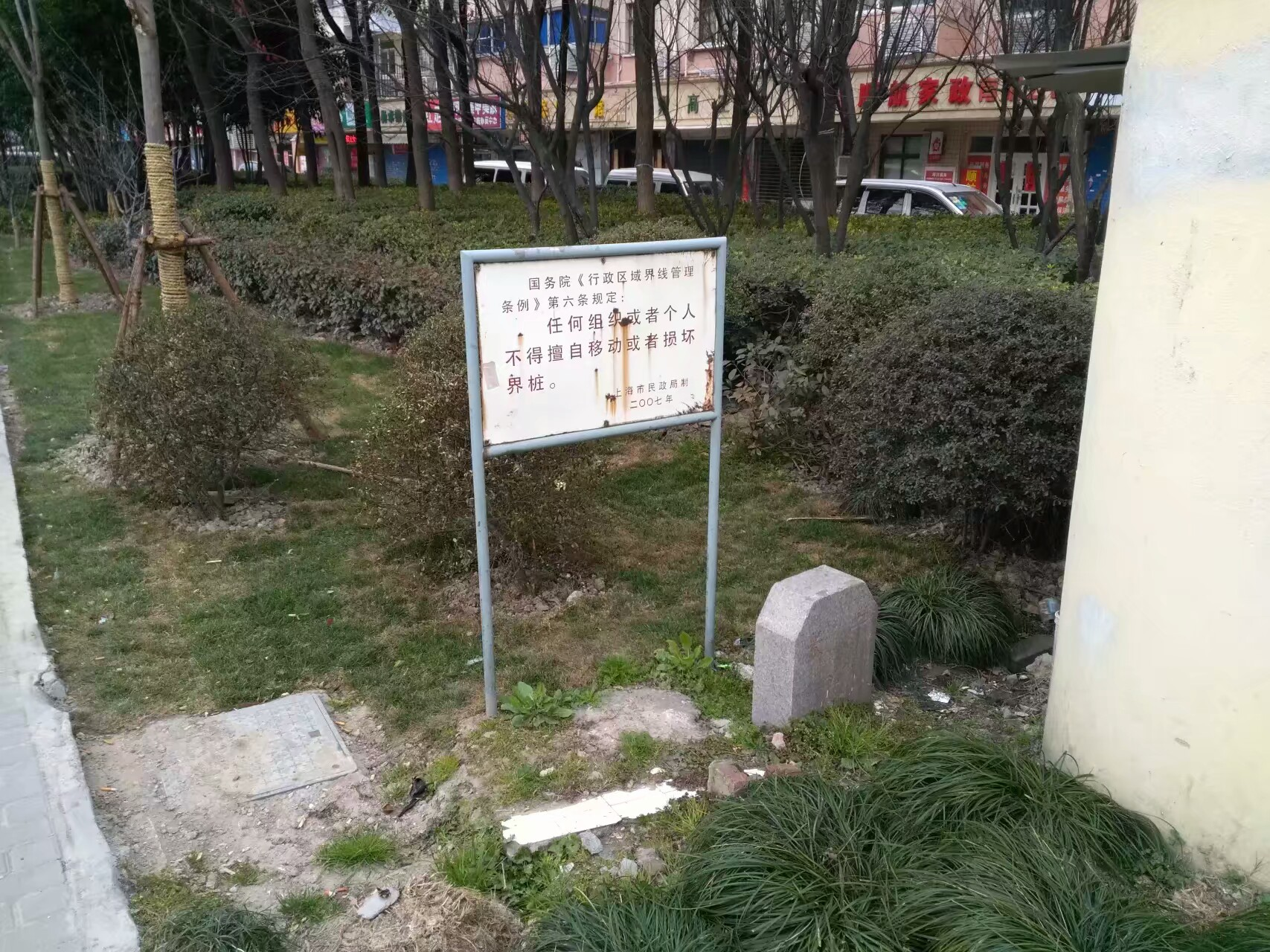 闵行长宁界碑(龙柏街道和程家桥街道之间)，位于沪青平公路虹桥机场新村西南角